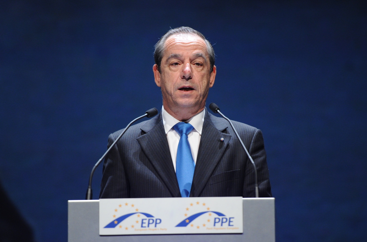 EPP Congress Marseille 7444